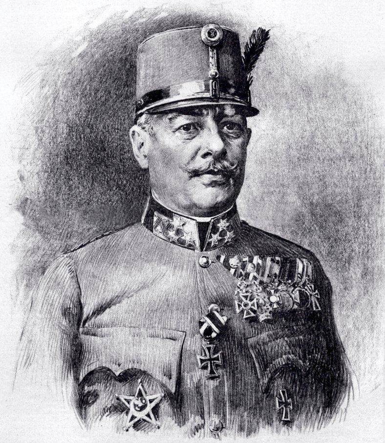 Viktor von Scheuchenstuel, Generaloberst 1917